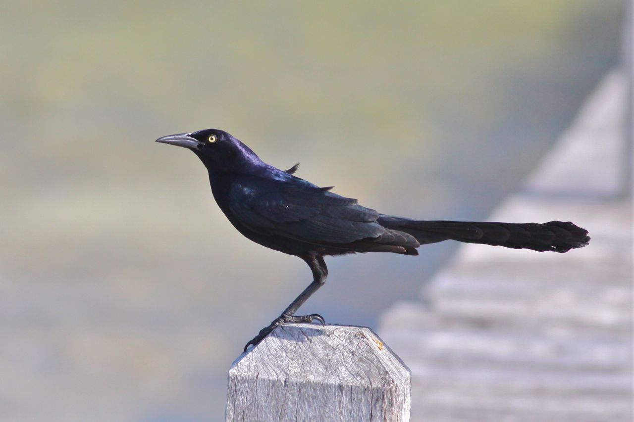 Ambergris Caye, Belize.